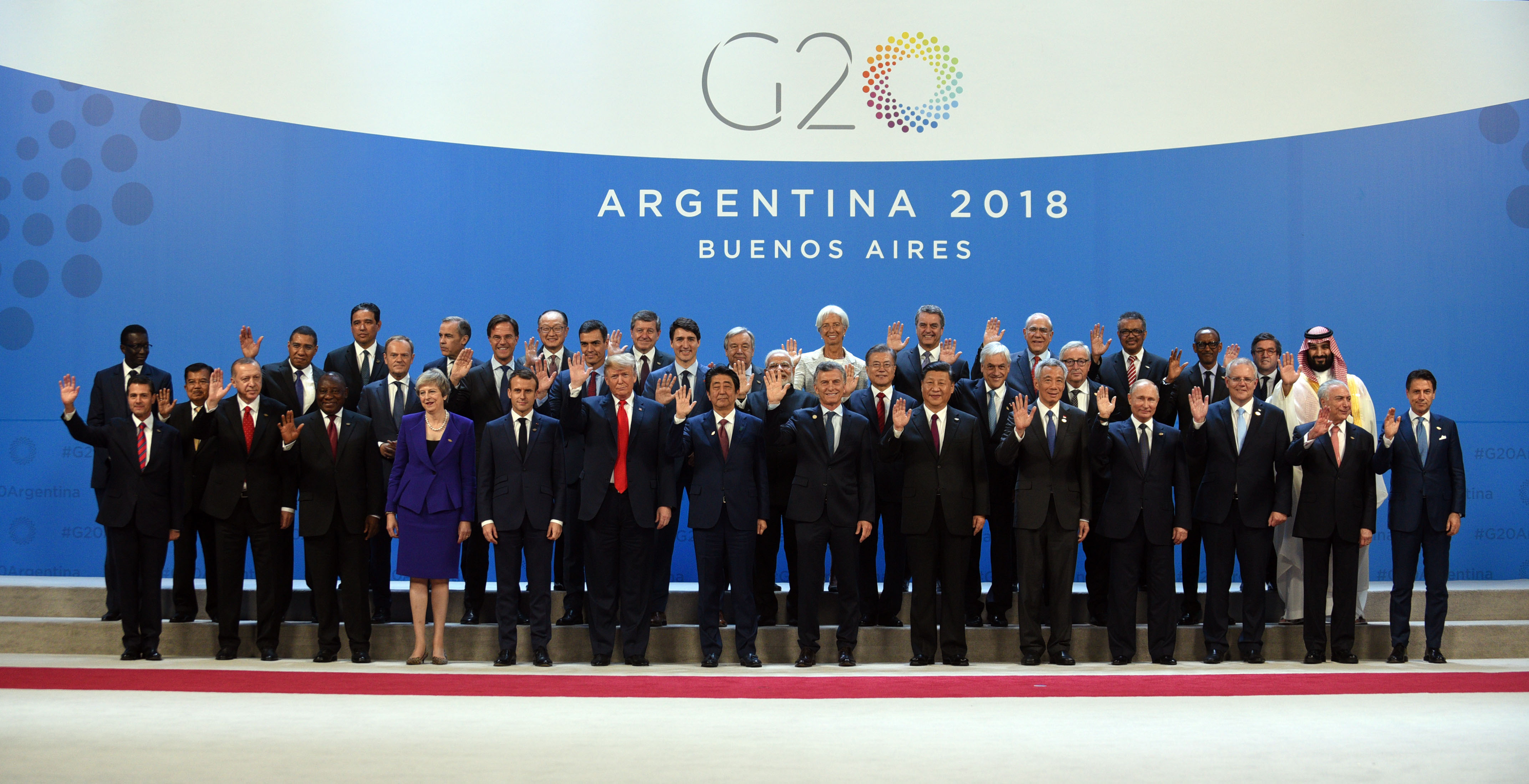 Foto de familia de la Cumbre de Lideres del G20